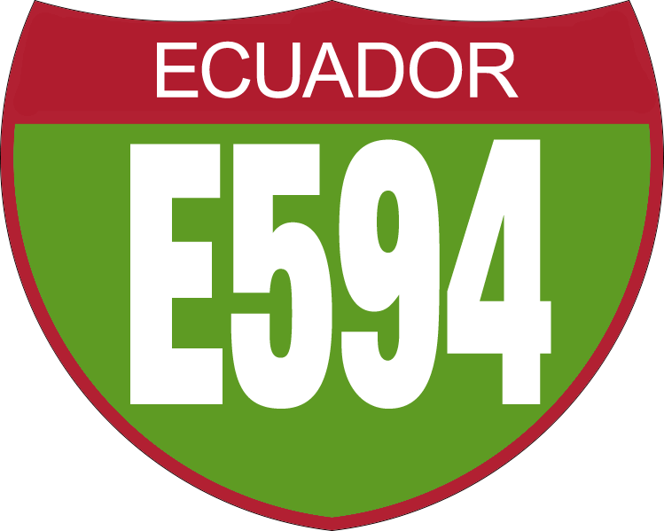 Disco de Identificación Ruta E594